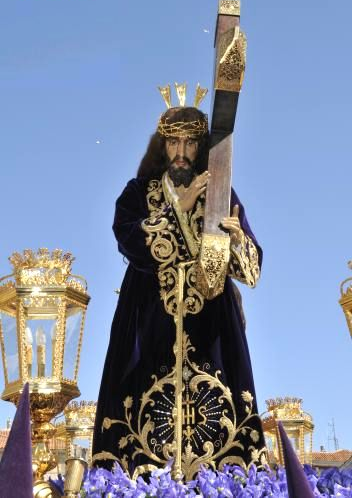 Ntro. Padre Jesús Nazareno